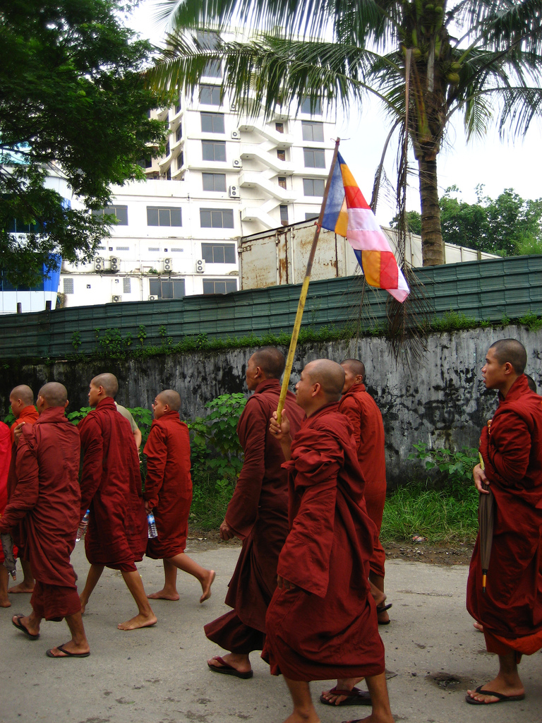 Monks Protesting in Burma, September 2007